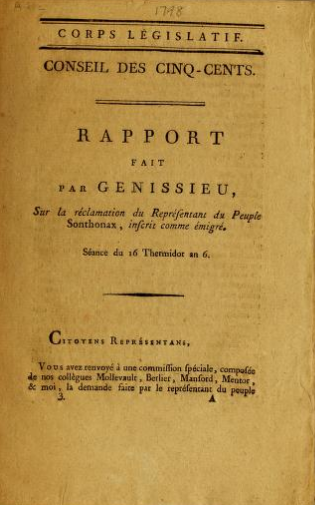 Rapport fait par Genissieu, sur la réclamation du représentant du peuple Sonthonax ... 16 Thermidor VI (3 Août 1798)